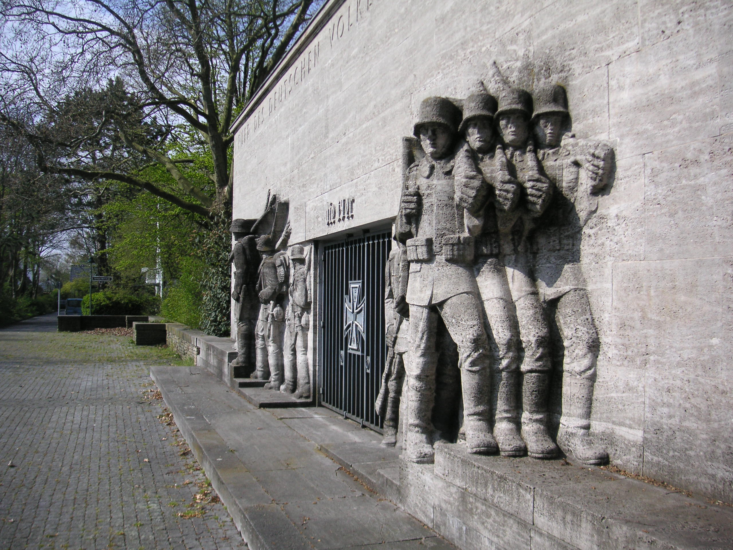 Düsseldorf-Golzheim, Denkmal für das 39er Regiment, Seitenansicht